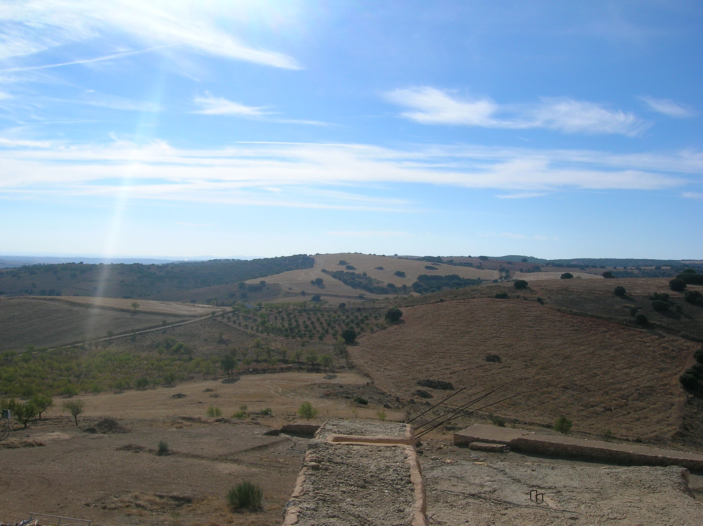 Panoramica general del Campo de Montiel de Albacete (alrededores de Lezuza, Albacete)